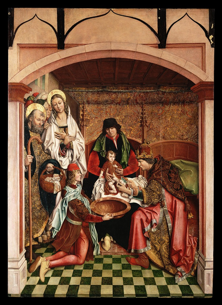 Circuncisión, tabla procedente del retablo de Ciudad Rodrigo, The University of Arizona Museum of Art